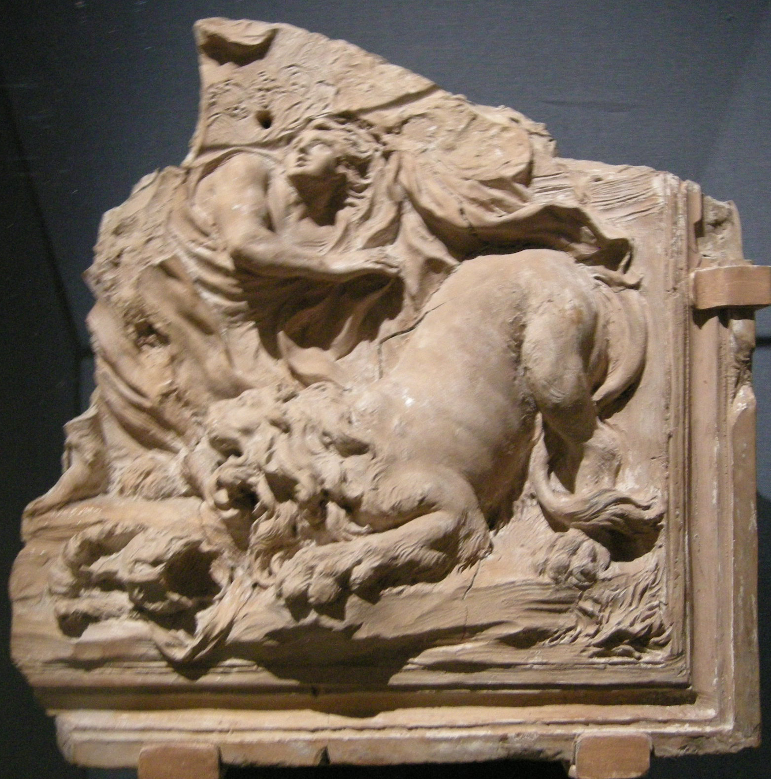 Melchiorre cafà, modello per il martirio di sant'eustachio in sant'agnese in agone, 1660 ca.